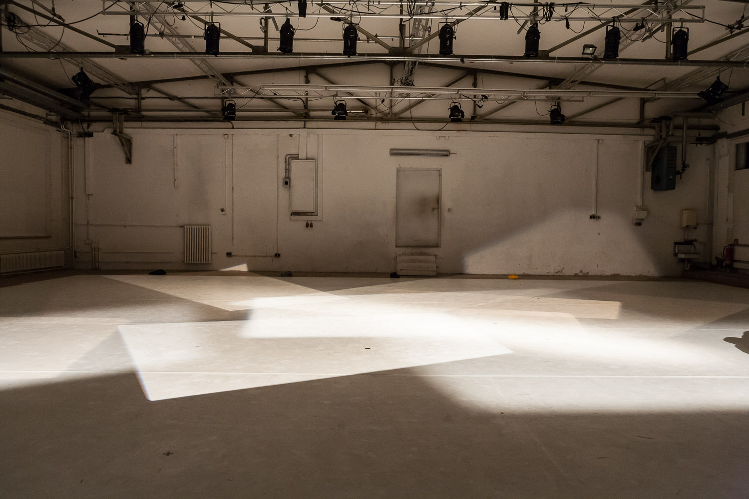 schwere reiter Bühne